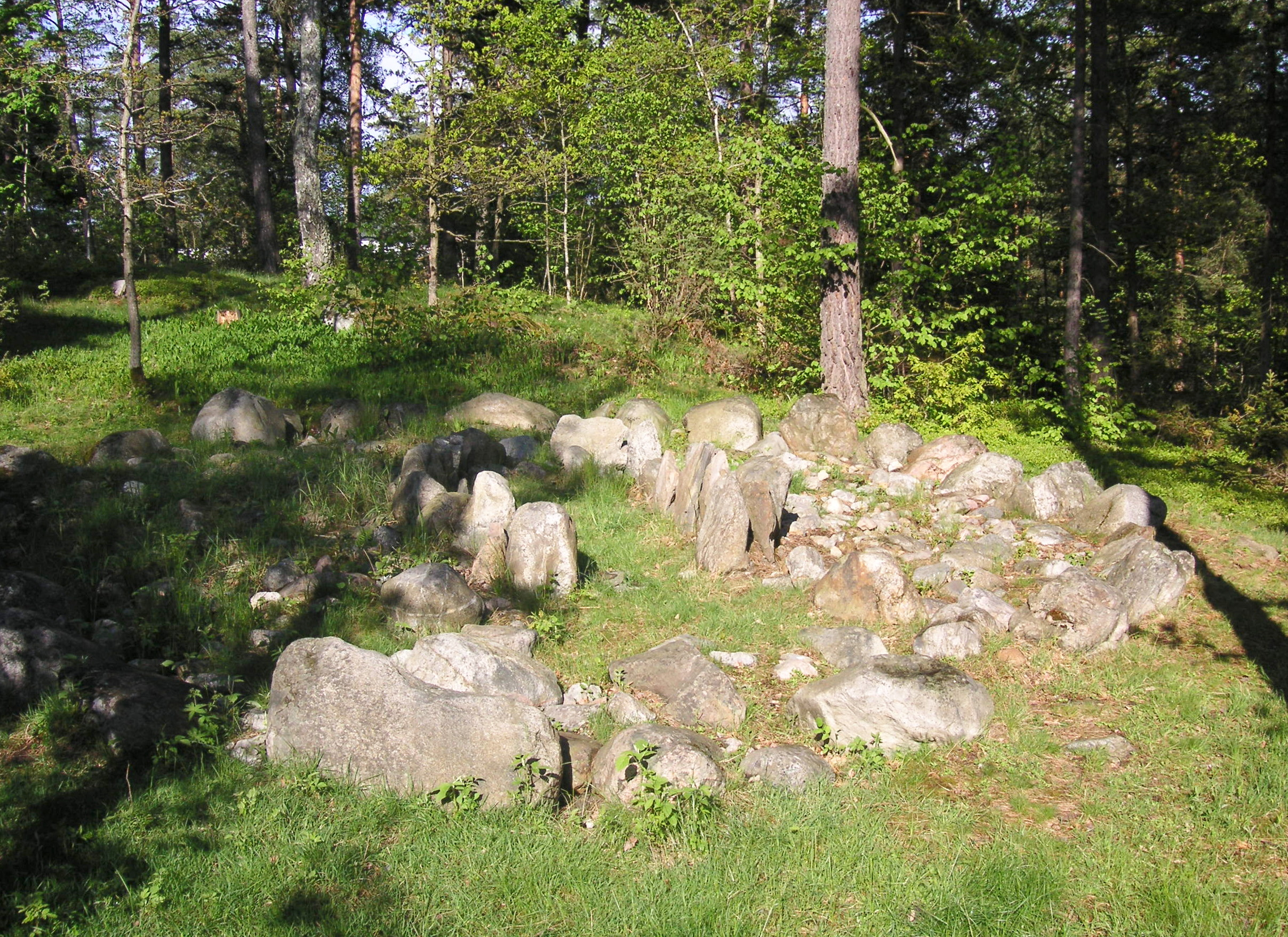 Rekonstruktion av Albykistan från stenåldern, vid Alby, Botkyrka kommun.